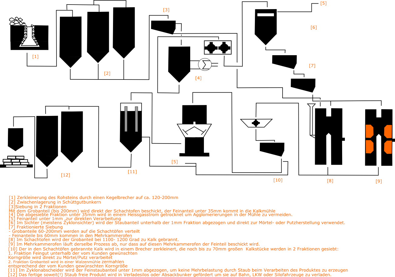 Schematischer Darstellung der Herstellung und Aufarbeitung von Kalk (PNG Bitmap Bild)